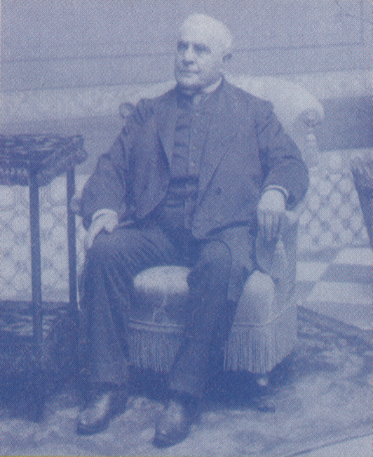 Retrato de Tomás Gomensoro, presidente de Uruguay entre 1872 y 1873.